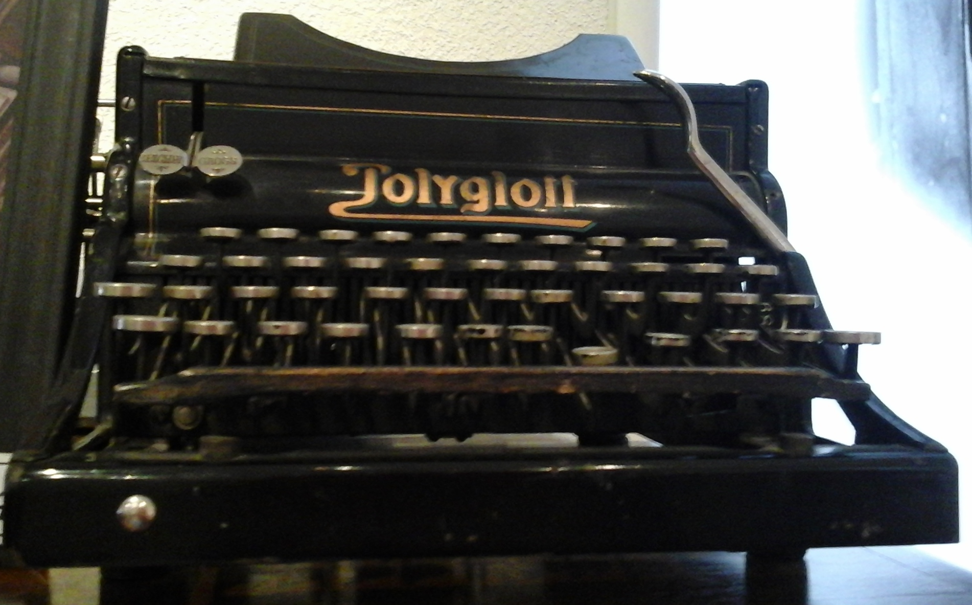 Американский кабинет Иосифа Бродского в Музее Анны Ахматовой в Фонтанном доме